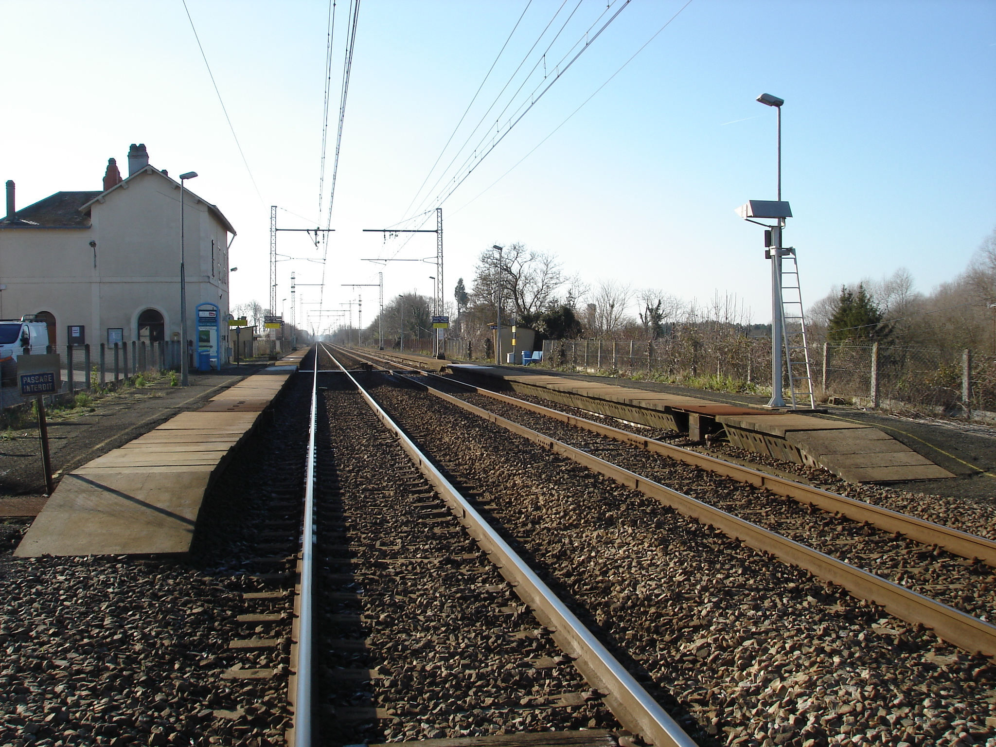 Gare de Neuvy-Pailloux (36) : Vue générale de la gare.